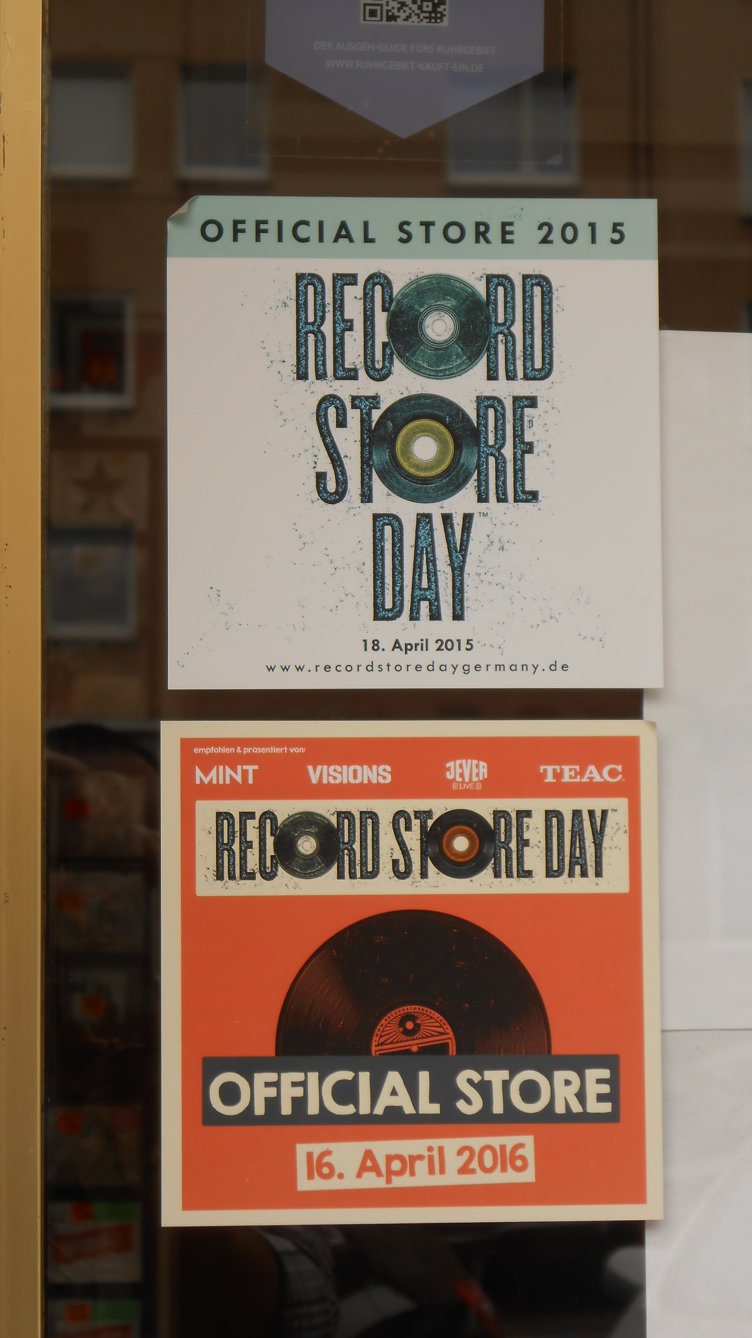 Aufkleber zu den Record Store Days an der Eingangstür des Archiv Schallplattenladens in Dortmund, an der Hohen Straße in der südlichen Innenstadt (nahe Kreuzviertel).